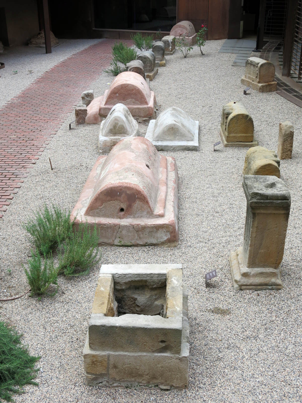 Via Sepulcral de la plaça de la Vila de Madrid (Barcelona) Object location41° 23′ 04.8″ N, 2° 10′ 19.66″ E